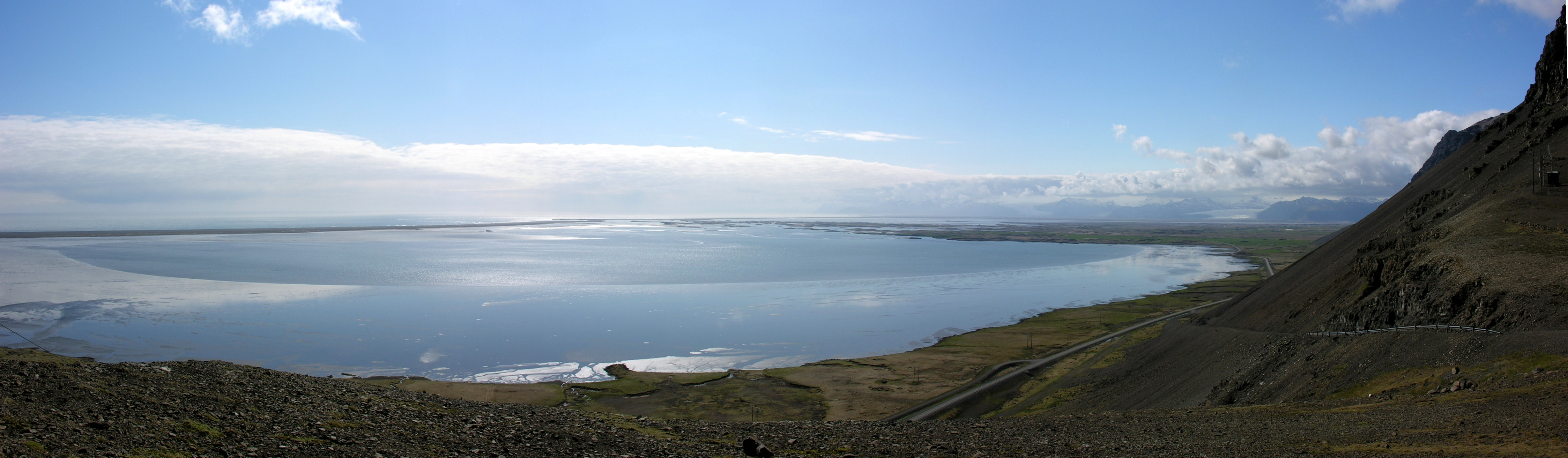 Skarðsfjörður